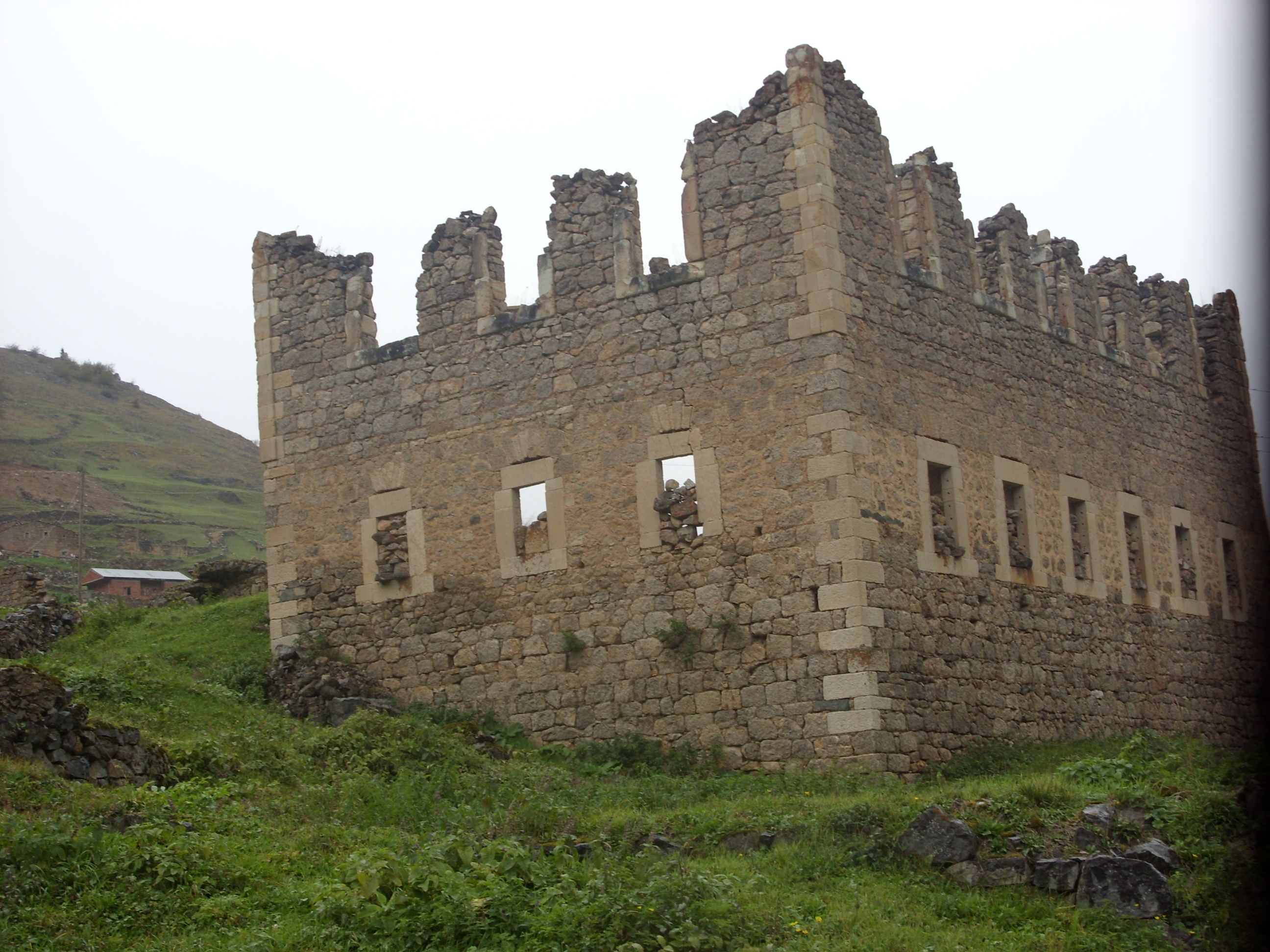 Santa Harabeleri